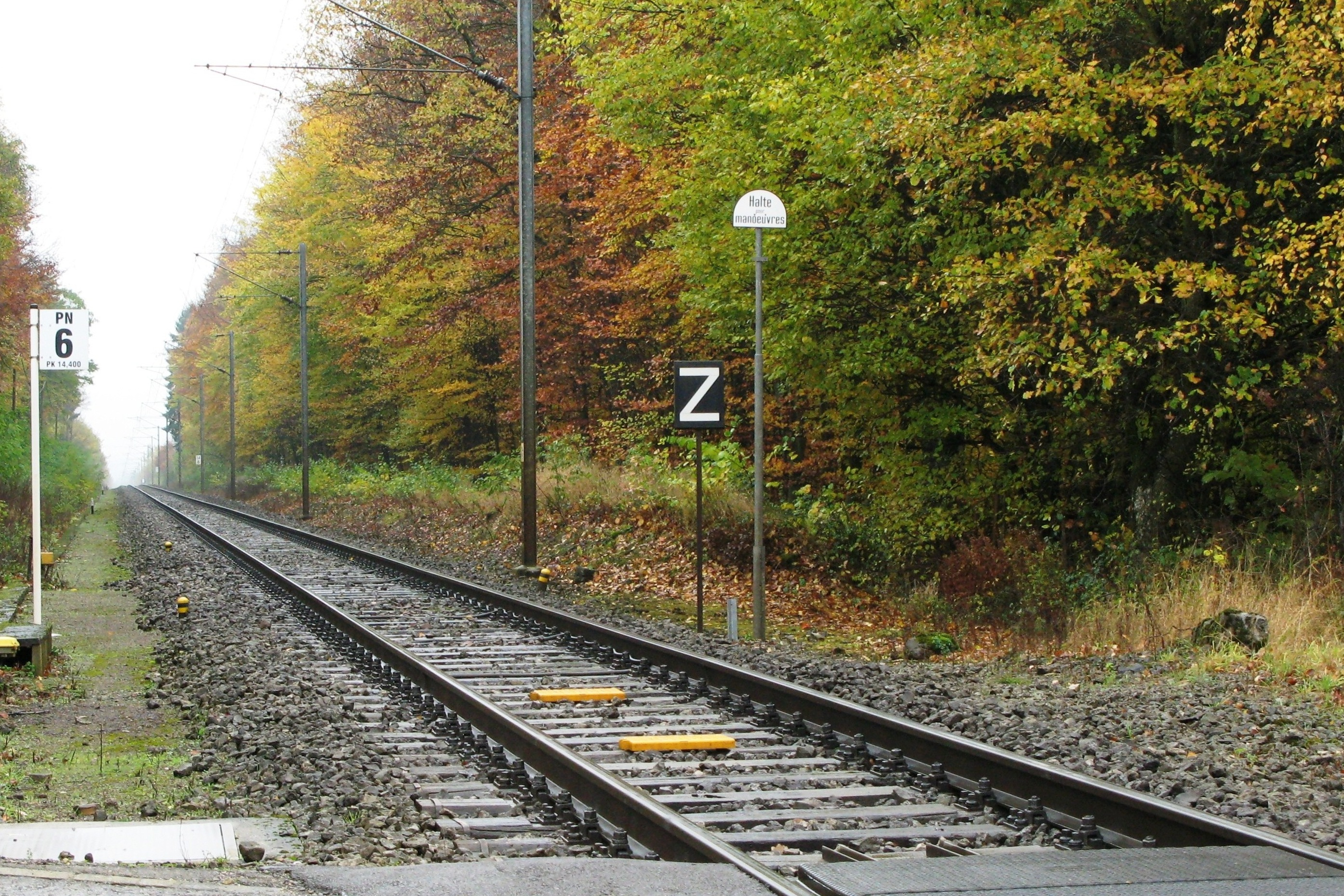 D'Streck Péiteng-Lëtzebuerg zu Leideleng am November 2008, gesinn an Direktioun Lëtzebuerg.